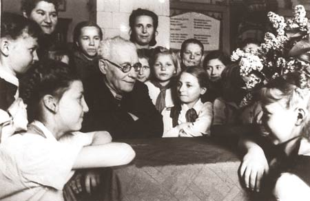 Беларускі дзіцячы пісьменнік Я.Маўр на сустрэчы з піянерамі СШ № 44 г. Мінска, прысвечанай 25-годдзю яго літаратурнай дзейнасці